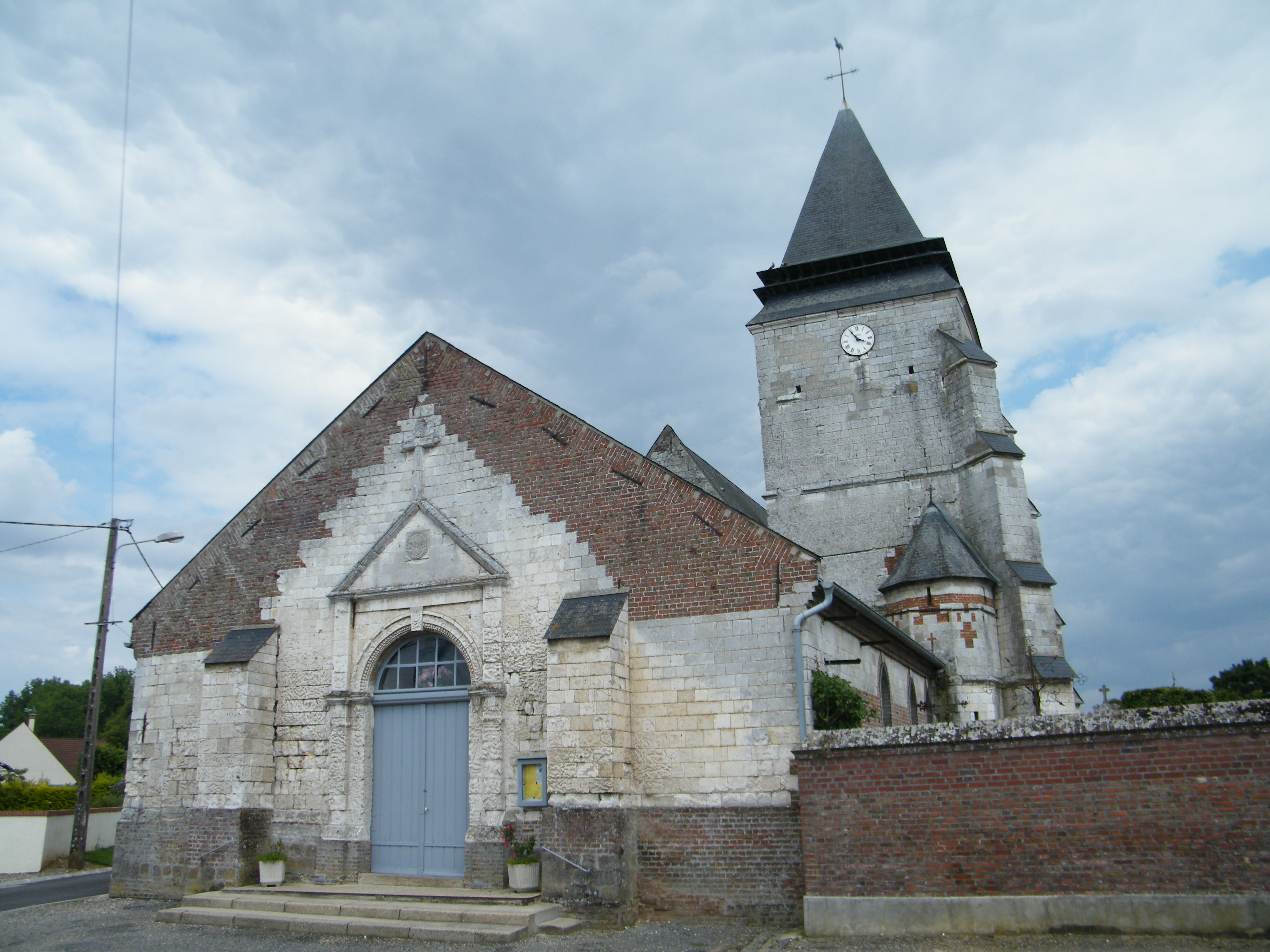 église.